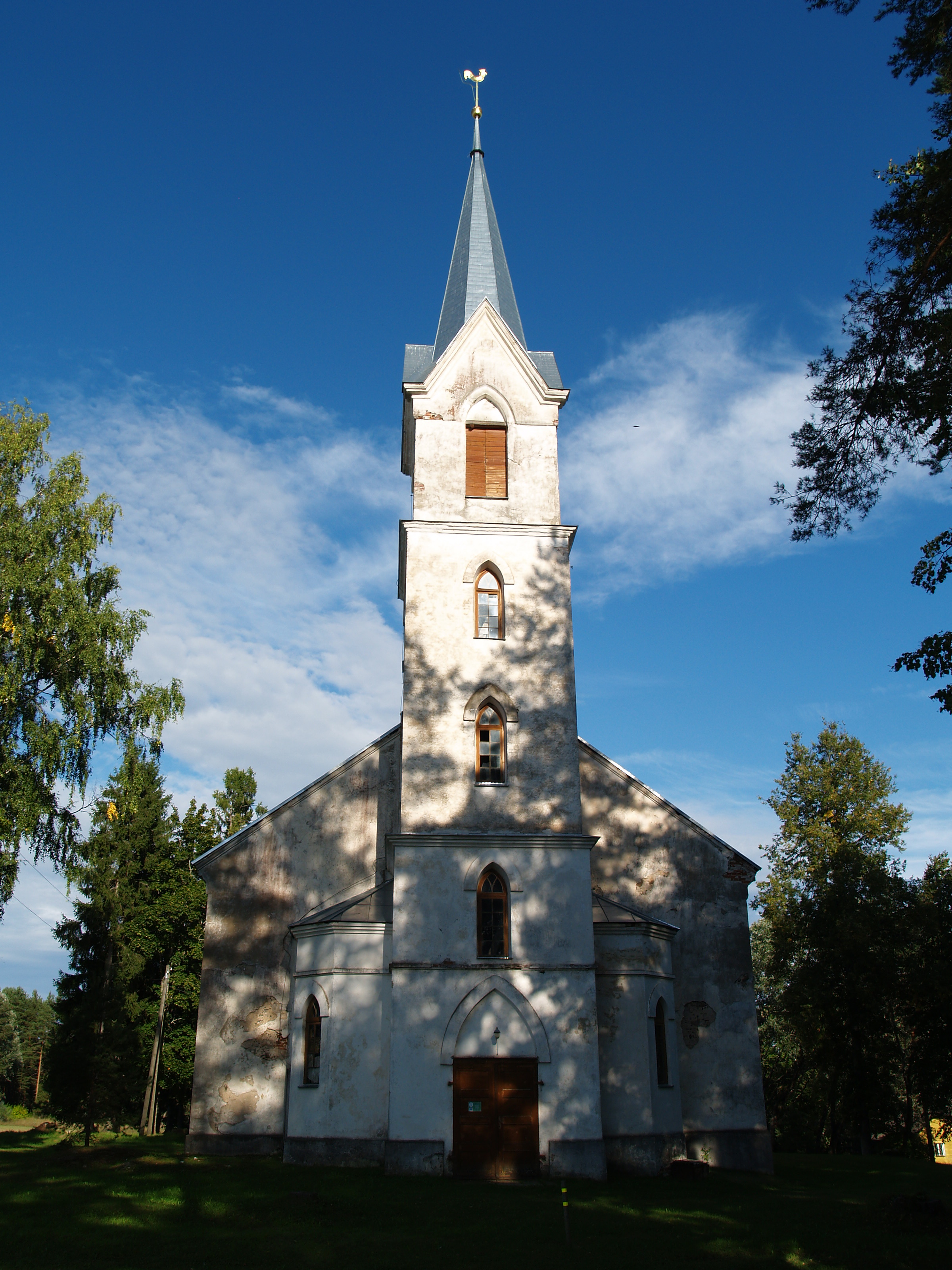 Hargla kirik